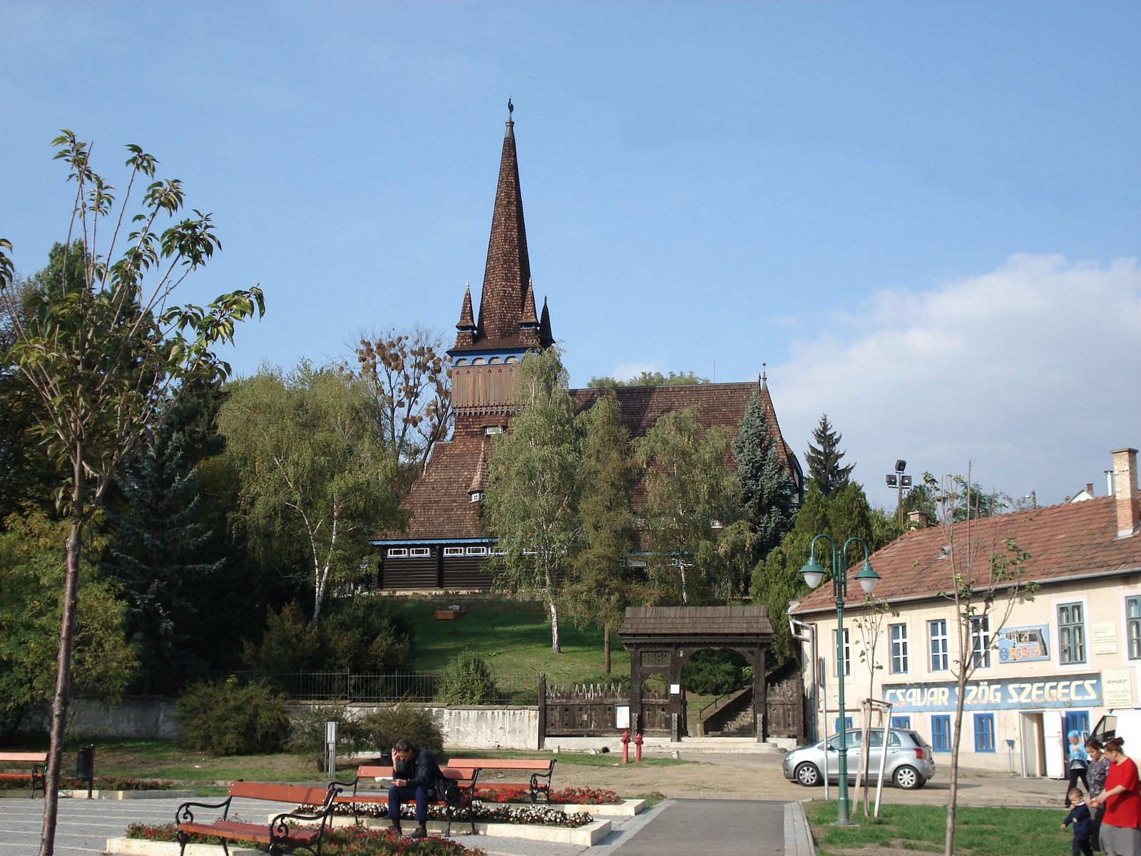 Ref. Deszkatemplom (Miskolc, TETEMVÁR, Deszkatemető) This is a photo of a monument in Hungary. Identifier: 2936